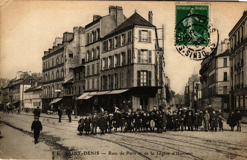 Saint-Denis.Rue de Paris et de la Légion d'Honneur